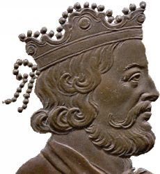 Portrait du Roi de france Childebert Ier Auteur Dassier, Jean (1676-1763 ; médailleur) Titre Médaille Publication [Paris], [ca 1720] Description : bronze ; 31 mm ; 15,59 g Licence: GPL et GFDL Notes Acq. 95-0635 Cote : BNF Richelieu Monnaies, médailles etantiques exemplaire unique L'ensemble est conservé dans deux boîtes cylindriques en buis. Tranche cannelée Identifiant 07700006 Détail du contenu : No d'image 1 Titre Childebert I roy de France Notes 1720 Sujet(s) Childebert (av.511-558 ; roi franc de Paris :Ier:+01+ Modifié par Rinaldum 12 jan 2004 à 13:16 (CET) Image trouvé sur le site Gallica de la BNF